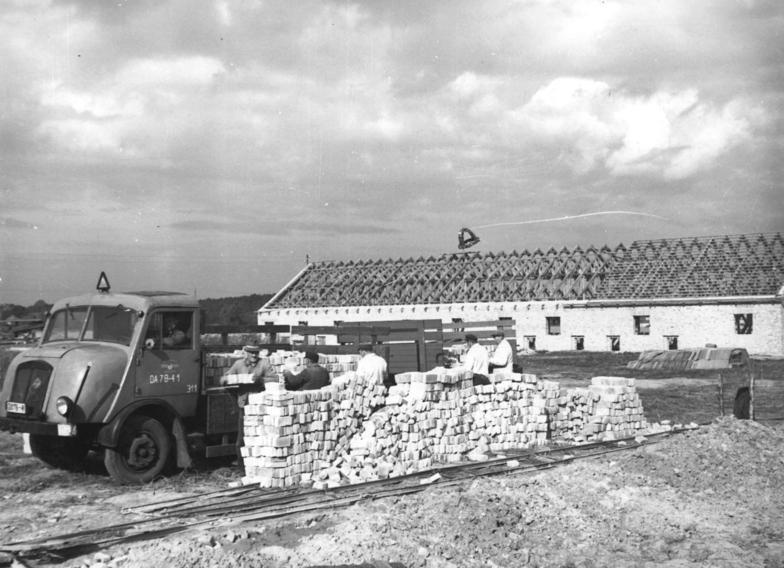 Schönfließ, LPG, Blick auf den Bauplatz Zentralbild Klein-Me-Th-6 Motive-19.10.1955 LPG Schönfließ schloß sich dem Wilhelm-Pieck-Aufgebot an-Zu Ehren des 80. Geburtstages unseres Präsidenten Wilhelm Pieck beschlossen die 81 Mitglieder der LPG „IV. Parteitag“ in Schönfließ, Kr. Oranienburg, konkrete Verpflichtungen zur Steigerung der tierischen und pflanzlichen Produktion. Die Baubrigade der LPG, die zum 10. Jahrestag der Bodenreform den Titel „Brigade der hervorragenden Leistungen“ verliehen bekam, will im Wilhelm-Pieck-Aufgebot bis zum 1.12.1955 zusätzlich ein Futterhaus bauen. Vom 5. April 1955 bis zum Monat Oktober wurden von der Baubrigade bereits drei neue Stallungen fertiggestellt. Bis 1960 werden ein Schweinekombinat, ein Rinderkombinat, Abferkelstallungen und ein Geflügelkombinat entstehen. Dieses große Bauvorhaben wird die Baubrigade gemeinsam mit freiwilligen Aufbauhelfern bewältigen. UBz: Ein Teil des Bauplatzes der LPG. Lastwagen bringen immer mehr neue Ziegelsteine, die von den Mitgliedern der Baubrigade schnell entladen werden.